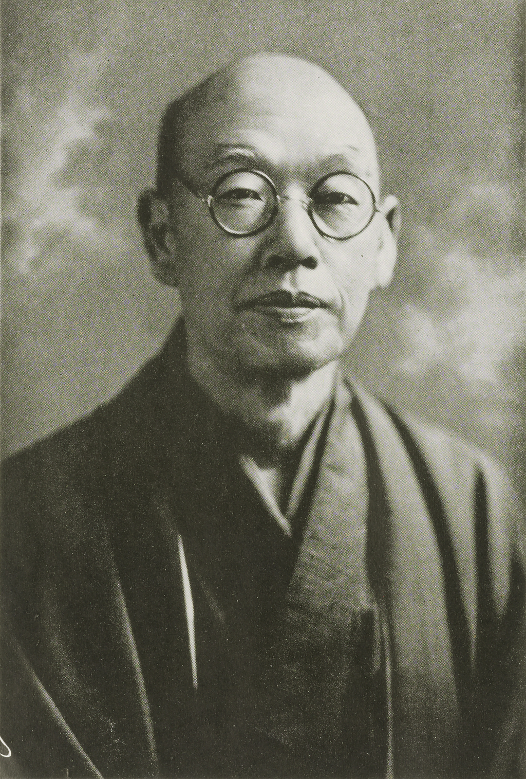 Portrait of Hojo Tokiyuki (北条時敬, 1858 – 1929)